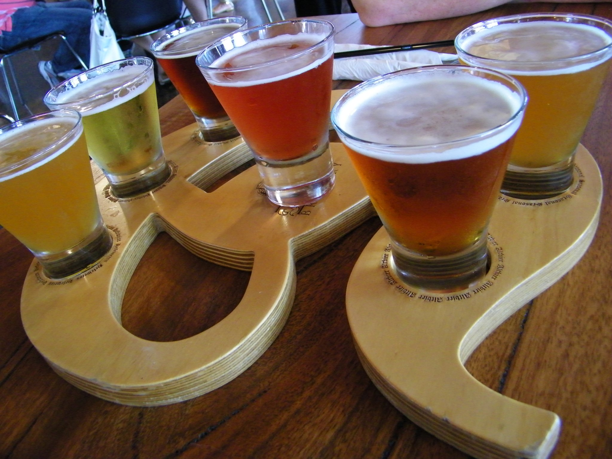 Duckstein Brewery at Saracen Estates